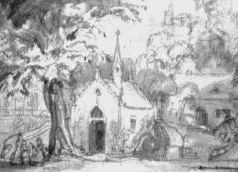 Radebeul Jägerberg Kapelle Hermann 1845